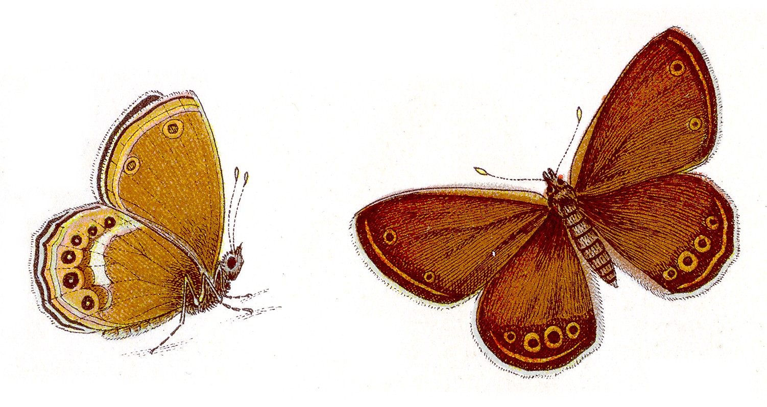 Wald-Wiesenvögelchen - Coenonympha hero